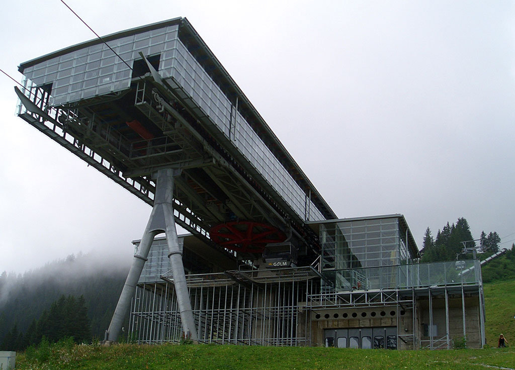 Mittelstation der Golmerbahn auf Matschwitz (im Montafon)